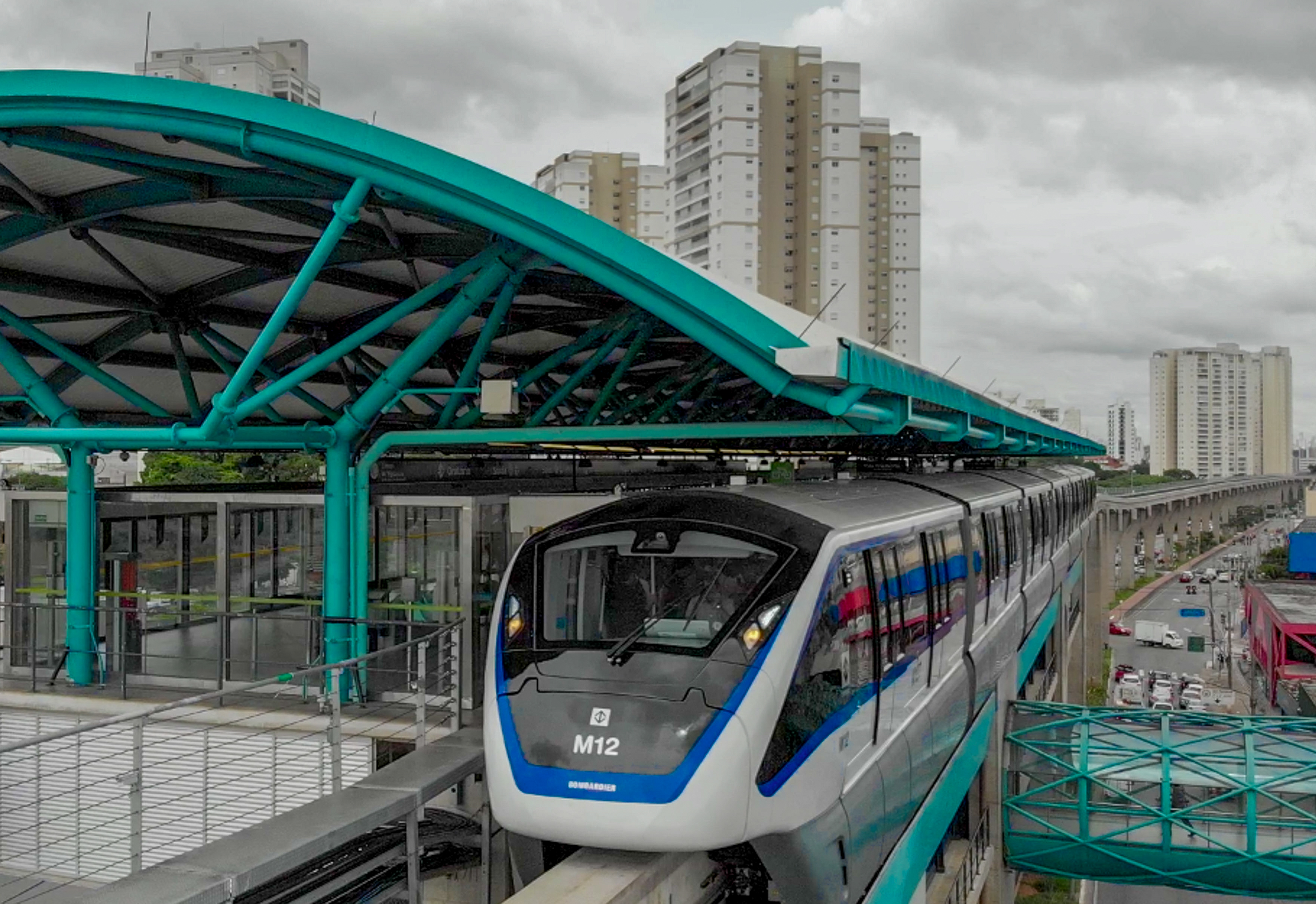 Viagem de Inspeção no trecho Oratório-São Mateus, Linha 15-Prata do Metrô (Monotrilho). Local: São Paulo/SP. Data: 20/02/2018 Foto: Governo do Estado de São Paulo